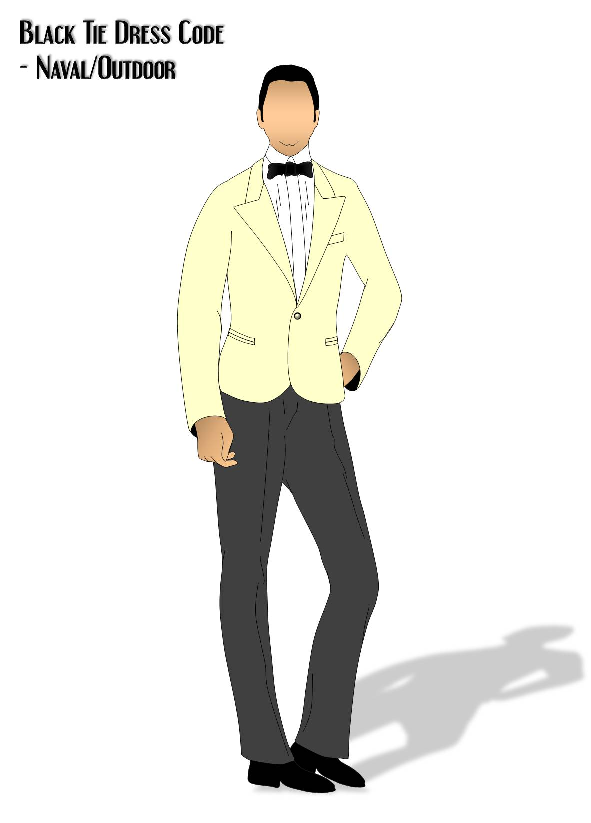 Smoking (Weisses Dinner Jacket) / Black Tie Dress Code (Naval or Outdoor=White Dinner Jacket